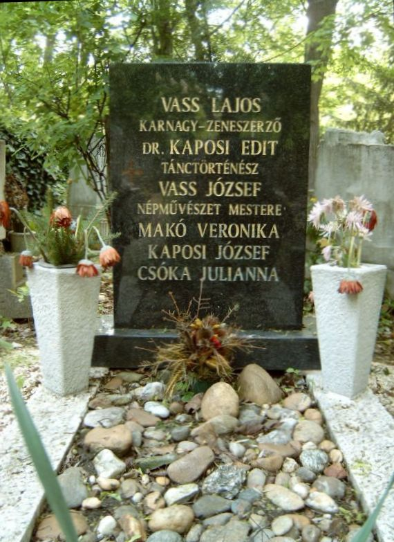 Kaposi Edit, dr. (Budapest, 1923- Budapest, 2006) a Népművelési Intézet főmunkatársa, neves tánckutató, néprajzos és férje, Vass Lajos (1927-1992) karnagy, zeneszerző sírja Budapesten. Új köztemető: 20-5-1.